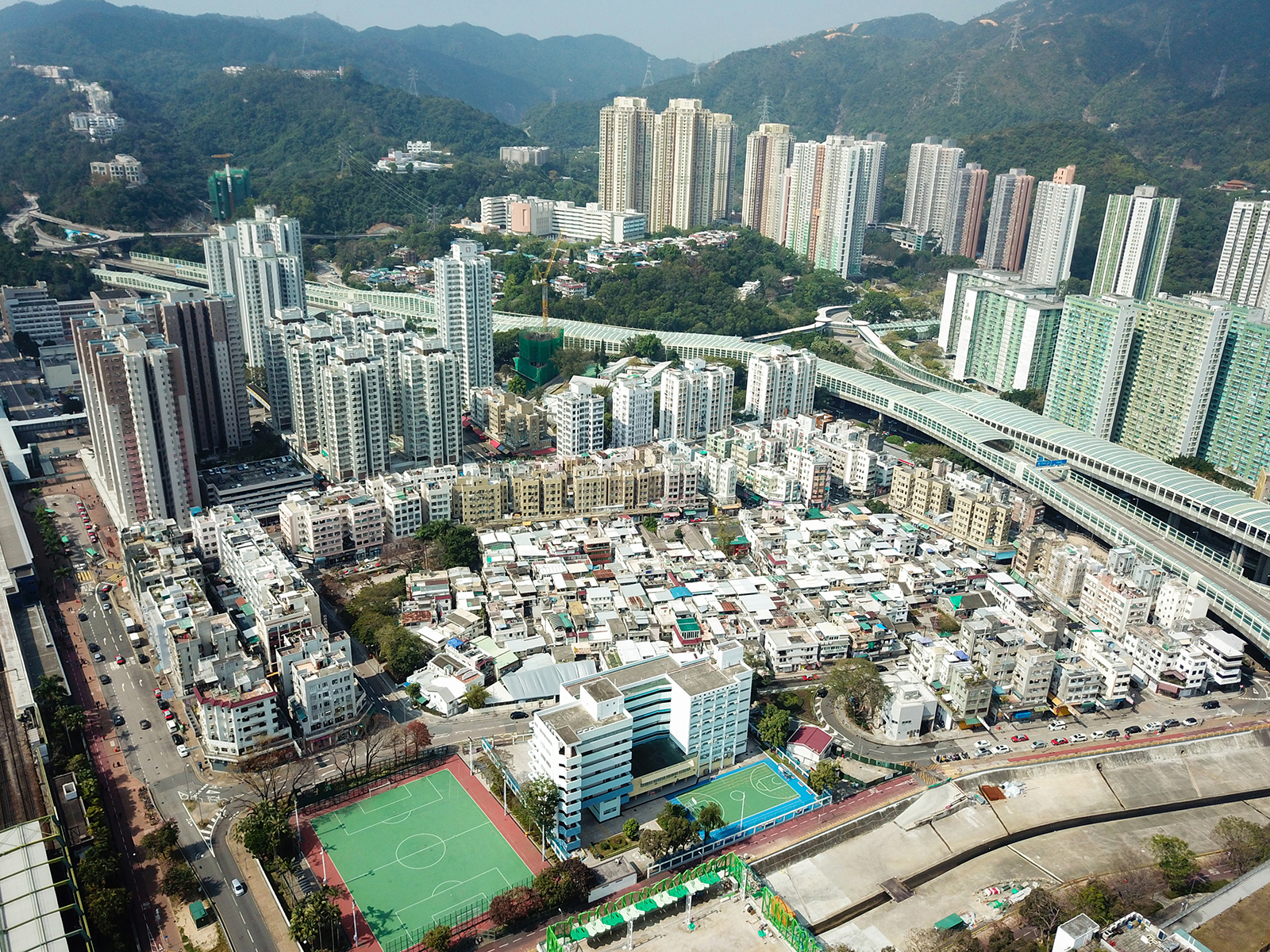 Tai Wai Hui